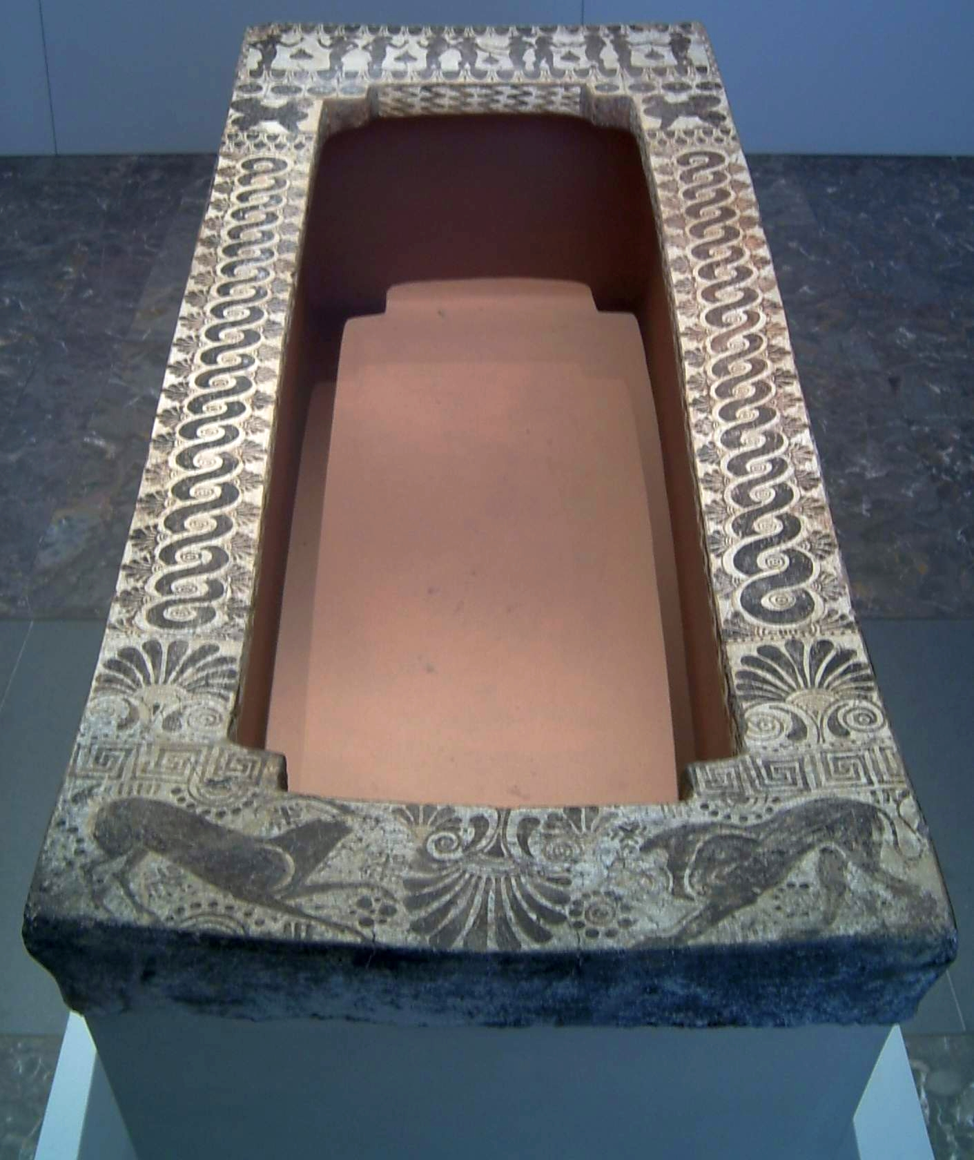 Klazomenischer Sarkophag aus Klazomenai mit homoerotischer Szene adeliger Jünglinge im Kopfteil; Länge 195 cm, Breite 74/62 cm, Tiefe 33,5 cm; bemalt im schwarzfigurigen Stil; Inv.-Nr.: 30030, Antikensammlung Berlin/Altes Museum